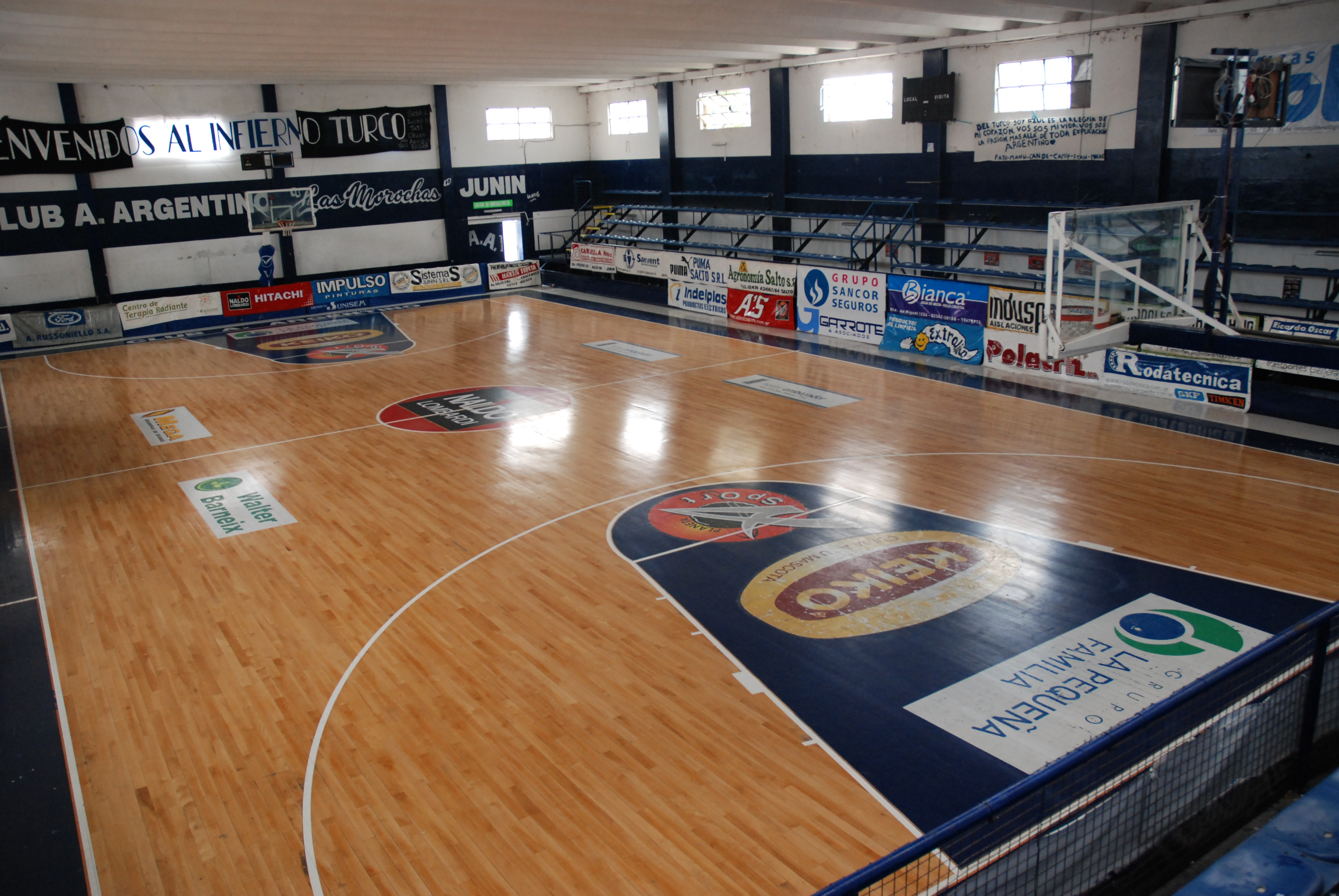 Estadio de básquetbol del Club Argentino de la ciudad de Junín, Argentina.